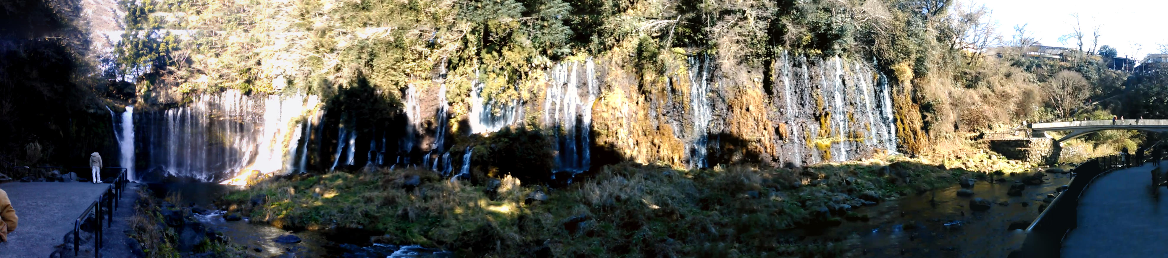 白糸の滝 パノラマ写真